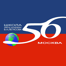 Флаг школы